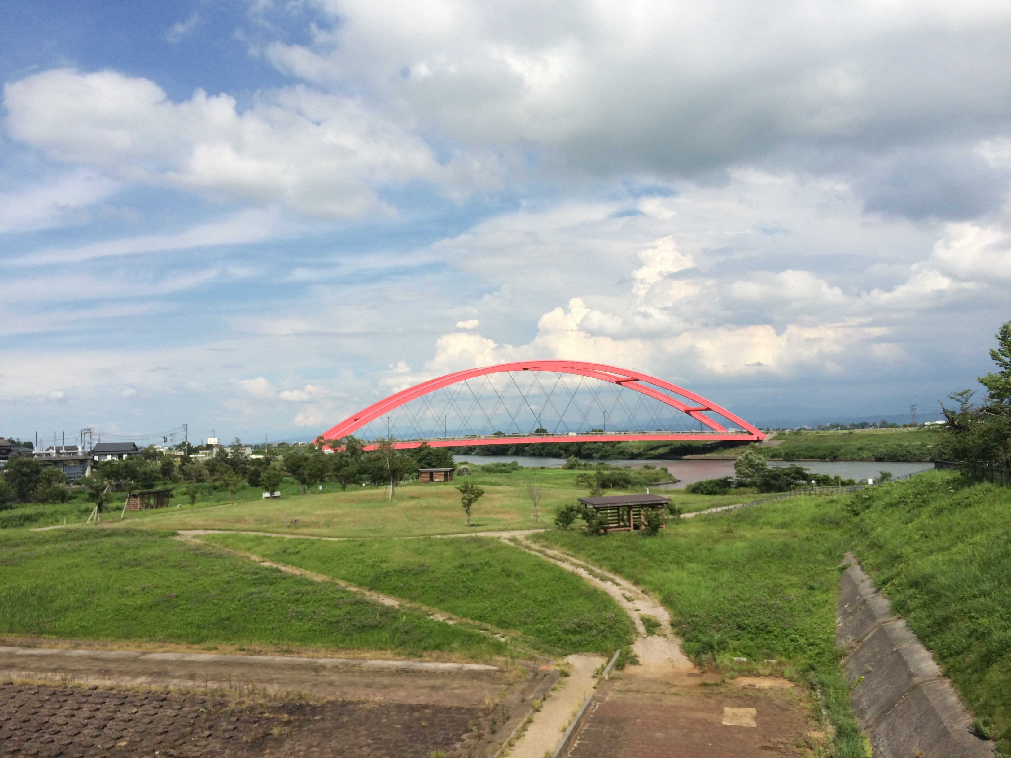 Ookozu-Bunsui(大河津分水)